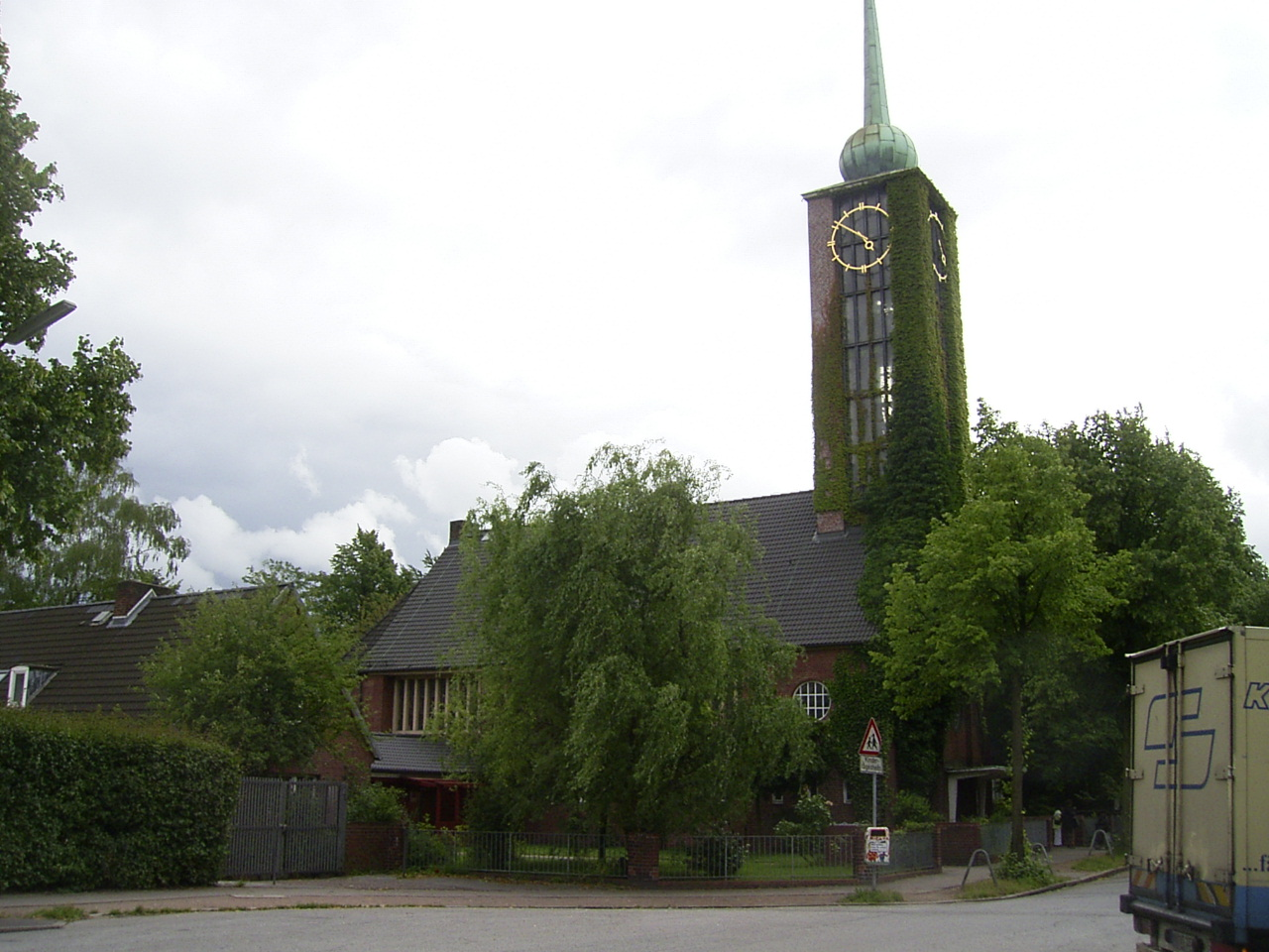 Die Immanuelkirche auf der Veddel wurde 1905 von Hugo Groothoff erbaut und nach den Zerstörungen des Zweiten Weltkriegs 1953-54 von Hermann Schöne in vereinfachter Form wieder aufgebaut.